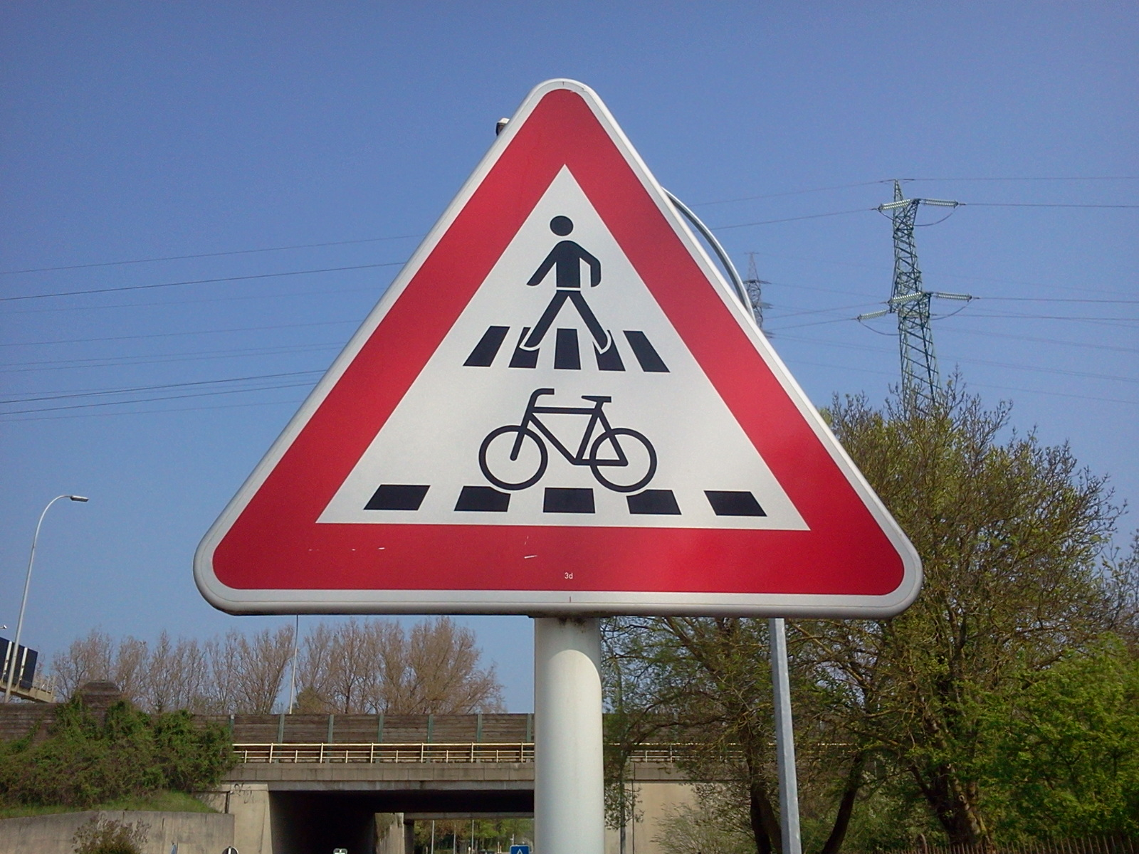 Verkéiersschëld A,11b aus dem Lëtzebuerger Code de la route dat uweist, datt ee bei en Iwwergank fir Foussgänger a Vëlosfuerer kënnt.